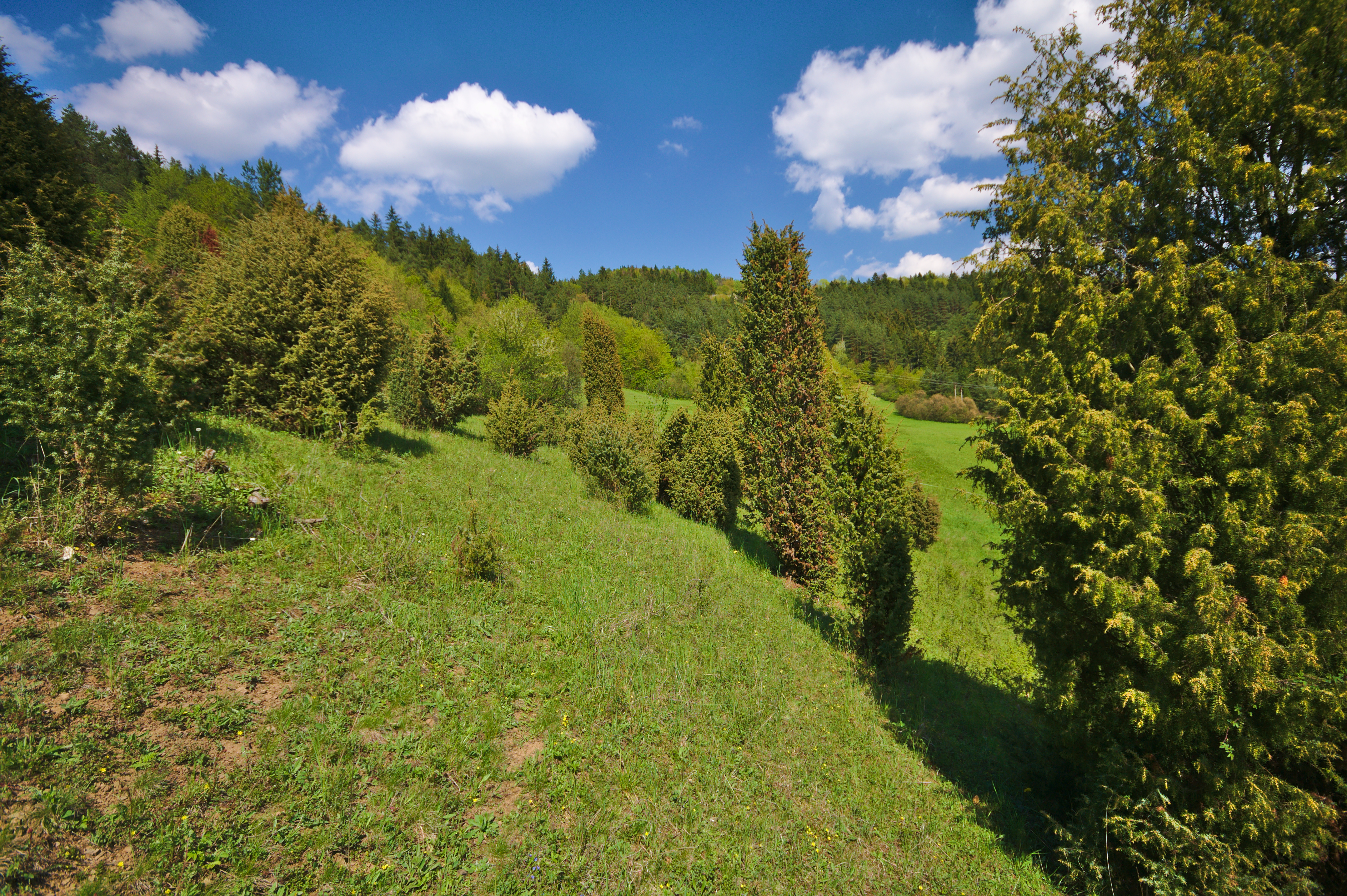 Národní přírodní památka Švařec, okres Žďár nad Sázavou